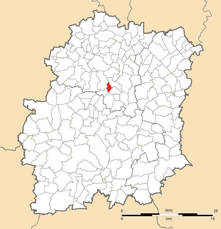 Carte de position d'Arpajon en Essonne.